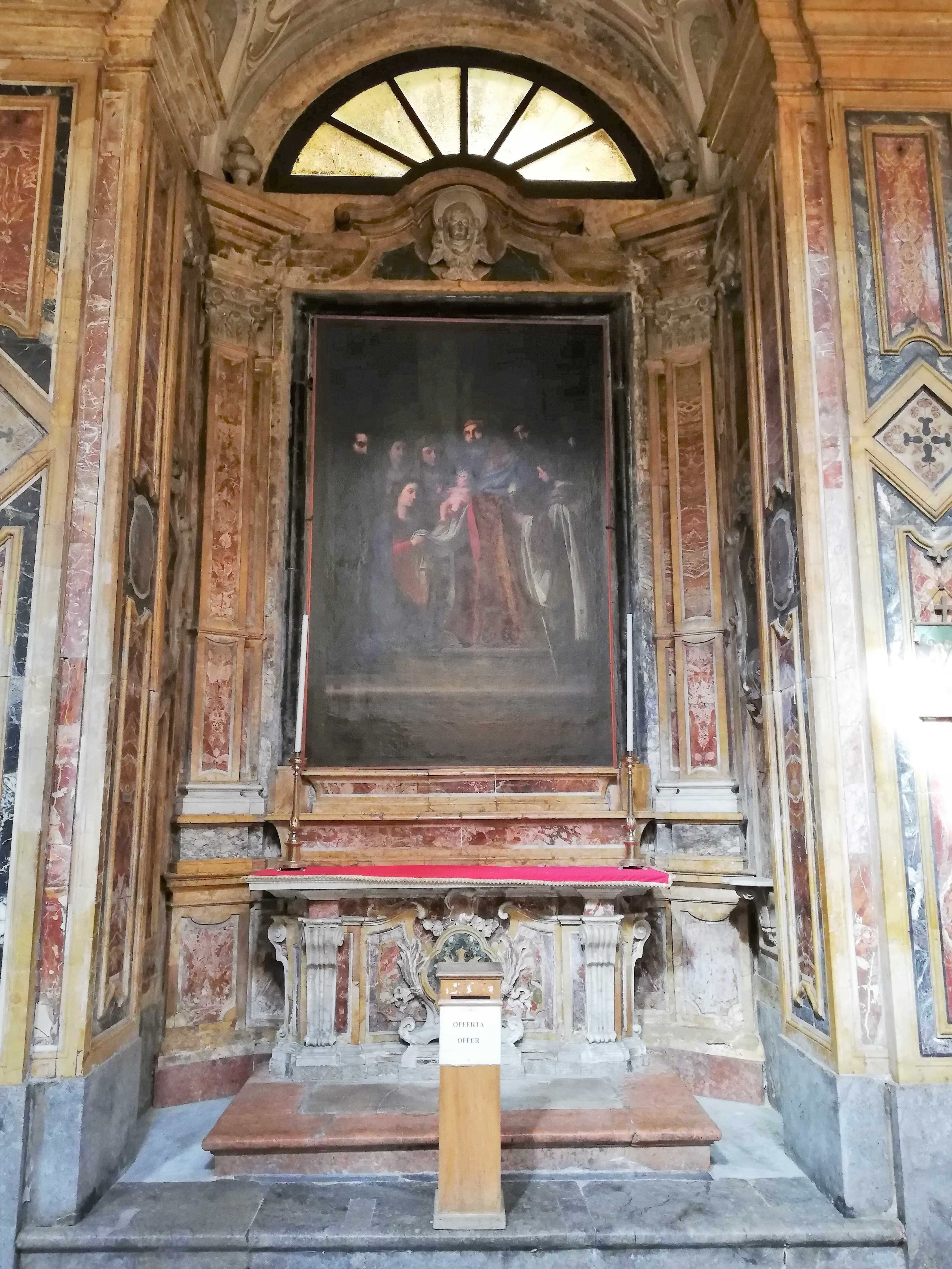 Quarta cappella destra.